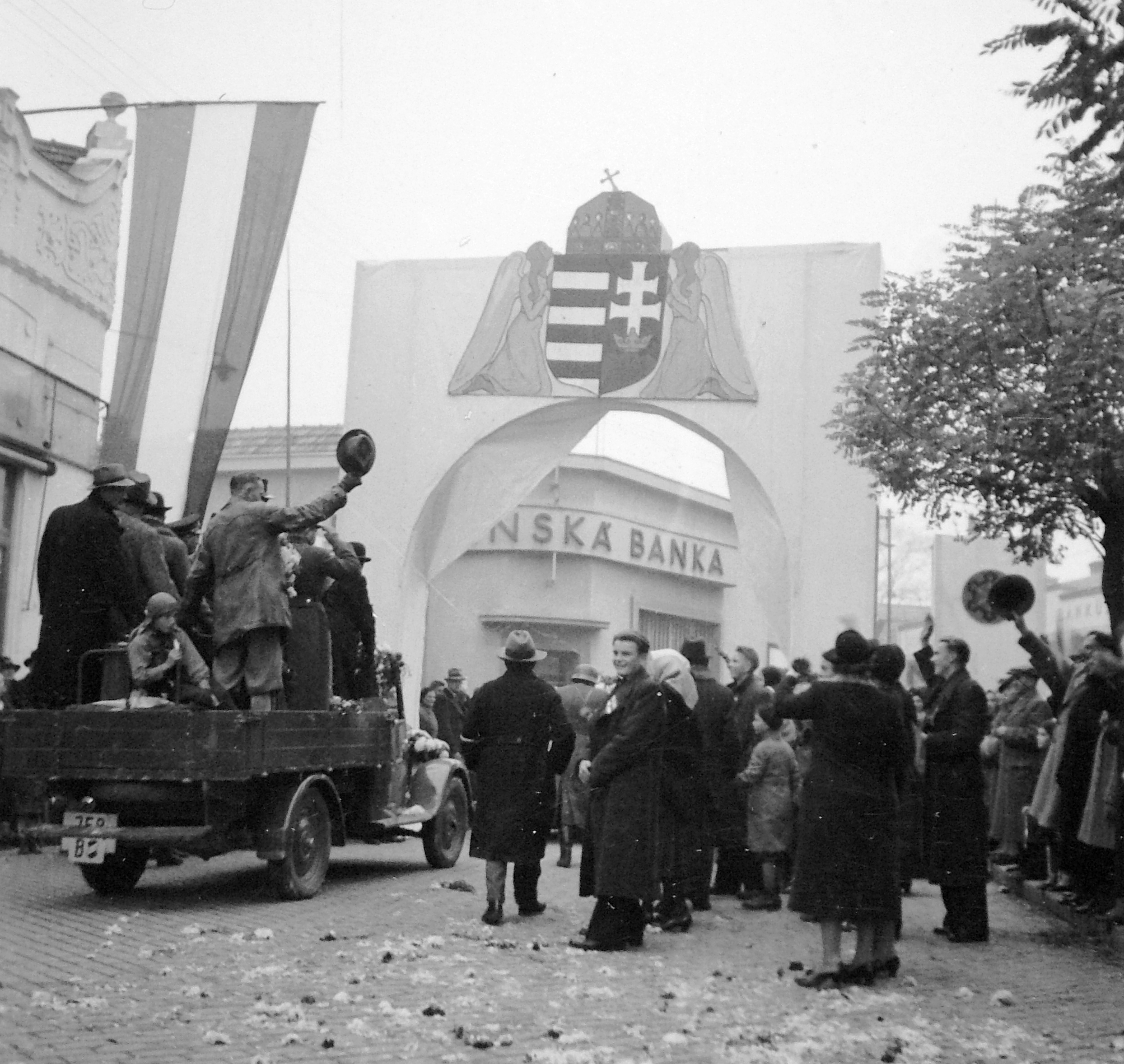 Milan Rastislav Štefánik (ekkor Széchenyi) utca a Törökszalasztó utca (Turecká ulica) felé nézve, a magyar csapatok bevonulása idején. Location: Slovakia, Nové Zámky Tags: crest, festive, territorial gain, flag, national emblem Title: Milan Rastislav Štefánik (ekkor Széchenyi) utca a Törökszalasztó utca (Turecká ulica) felé nézve, a magyar csapatok bevonulása idején.